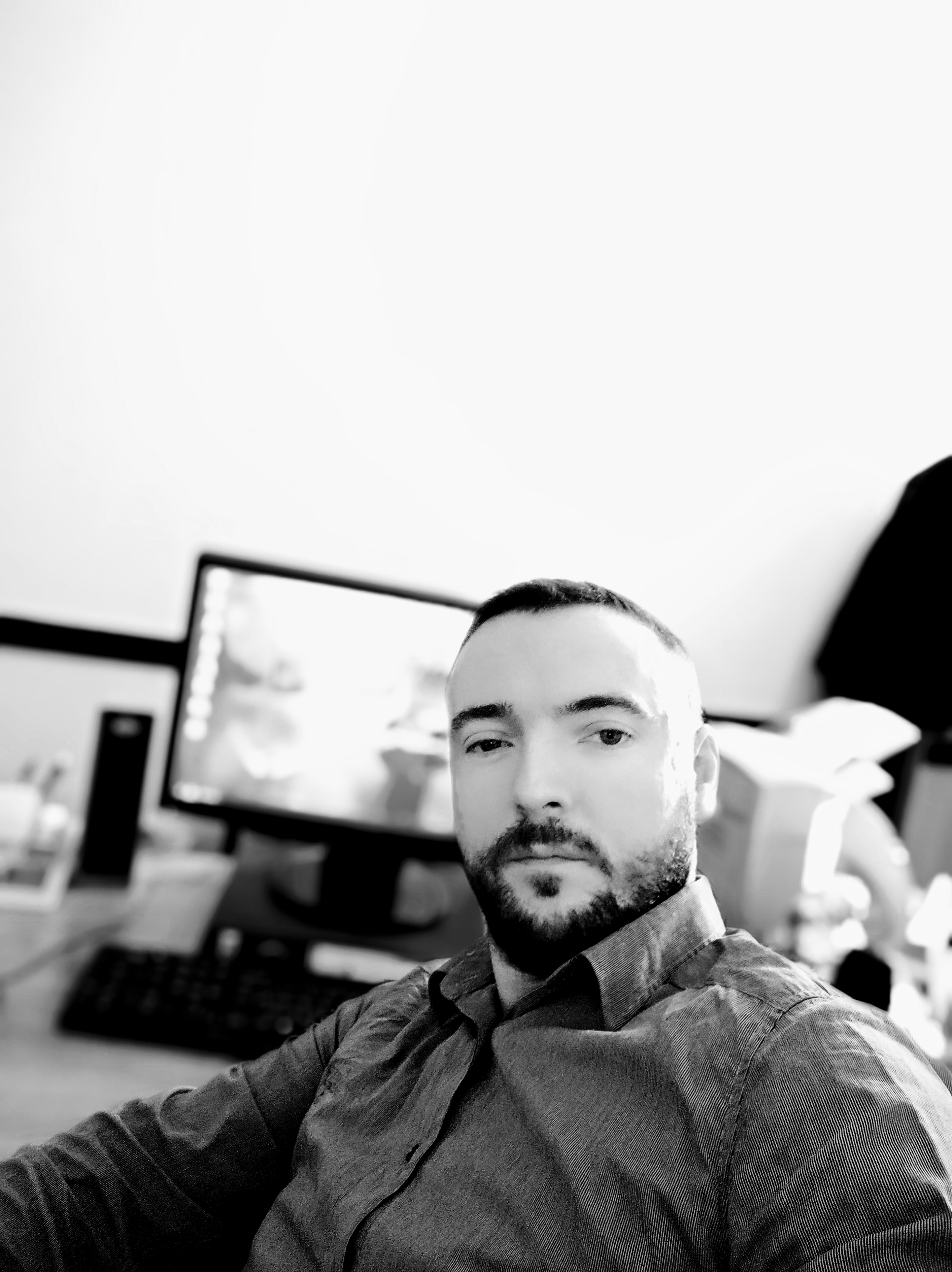 Glazbenik, književnik, Mostar.